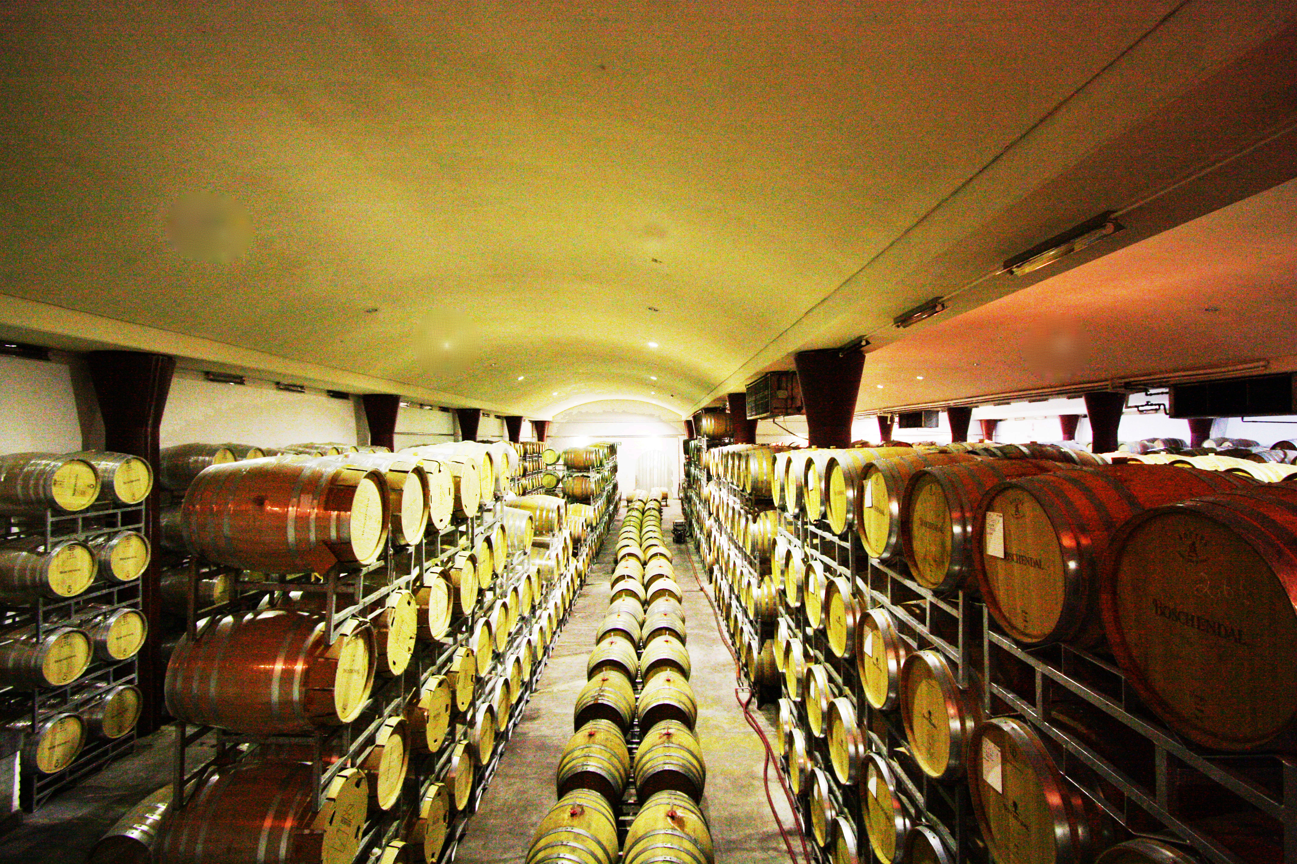 Cave de Boschendal Estate